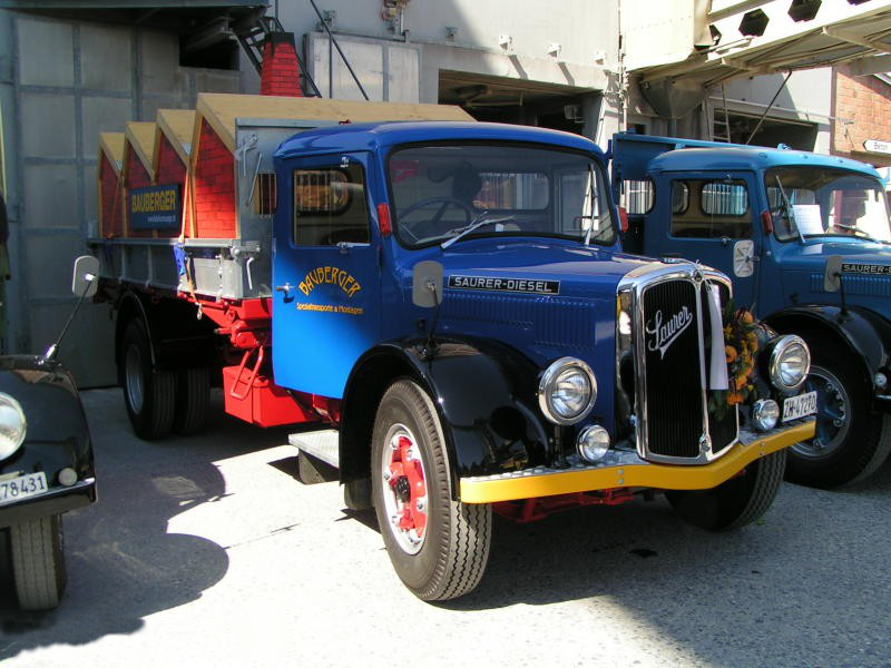 Saurer Oldtimer am Saurer-Treffen 2004